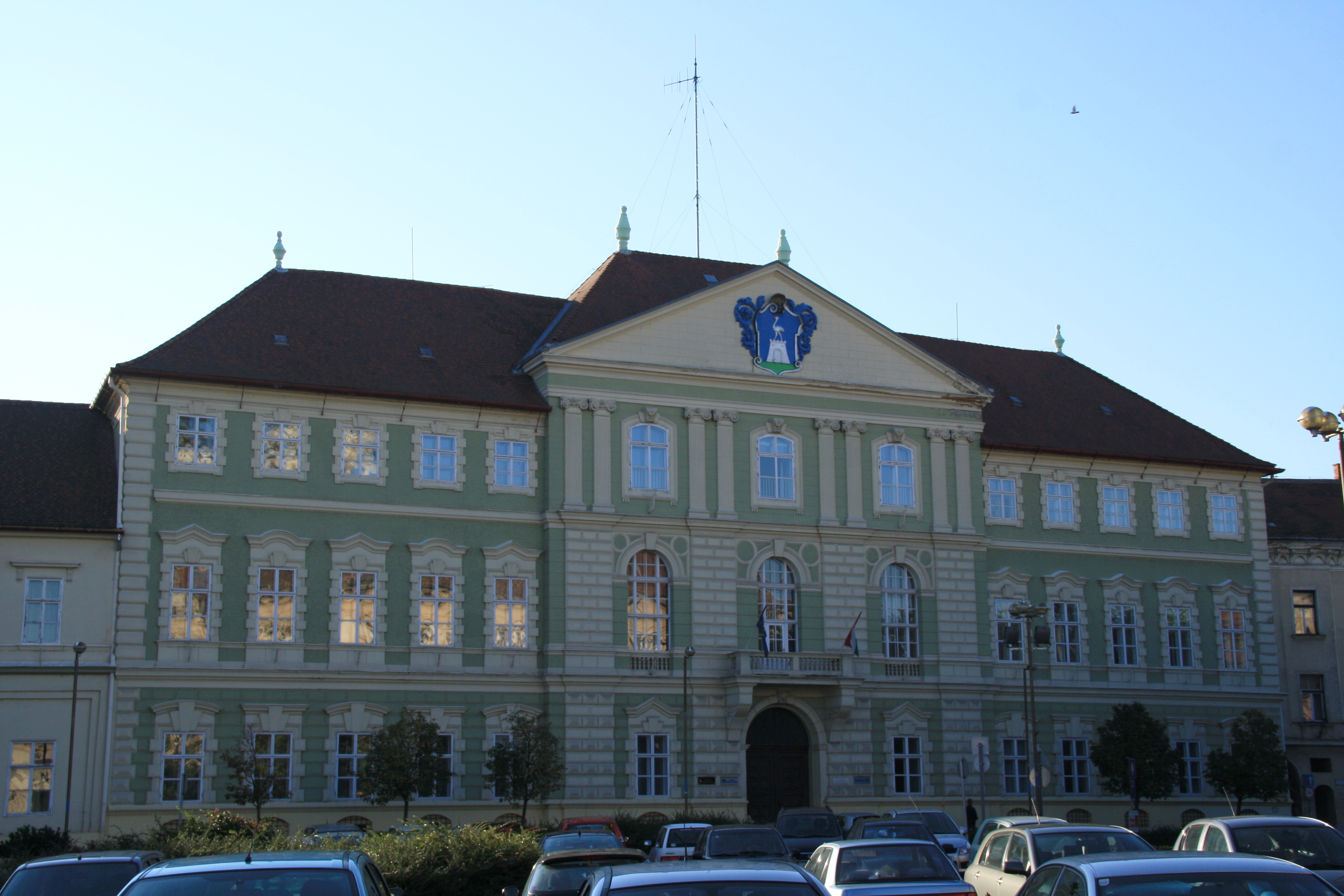 Megyi tanácsház (Szombathely, Berzsenyi Dániel tér 1.)